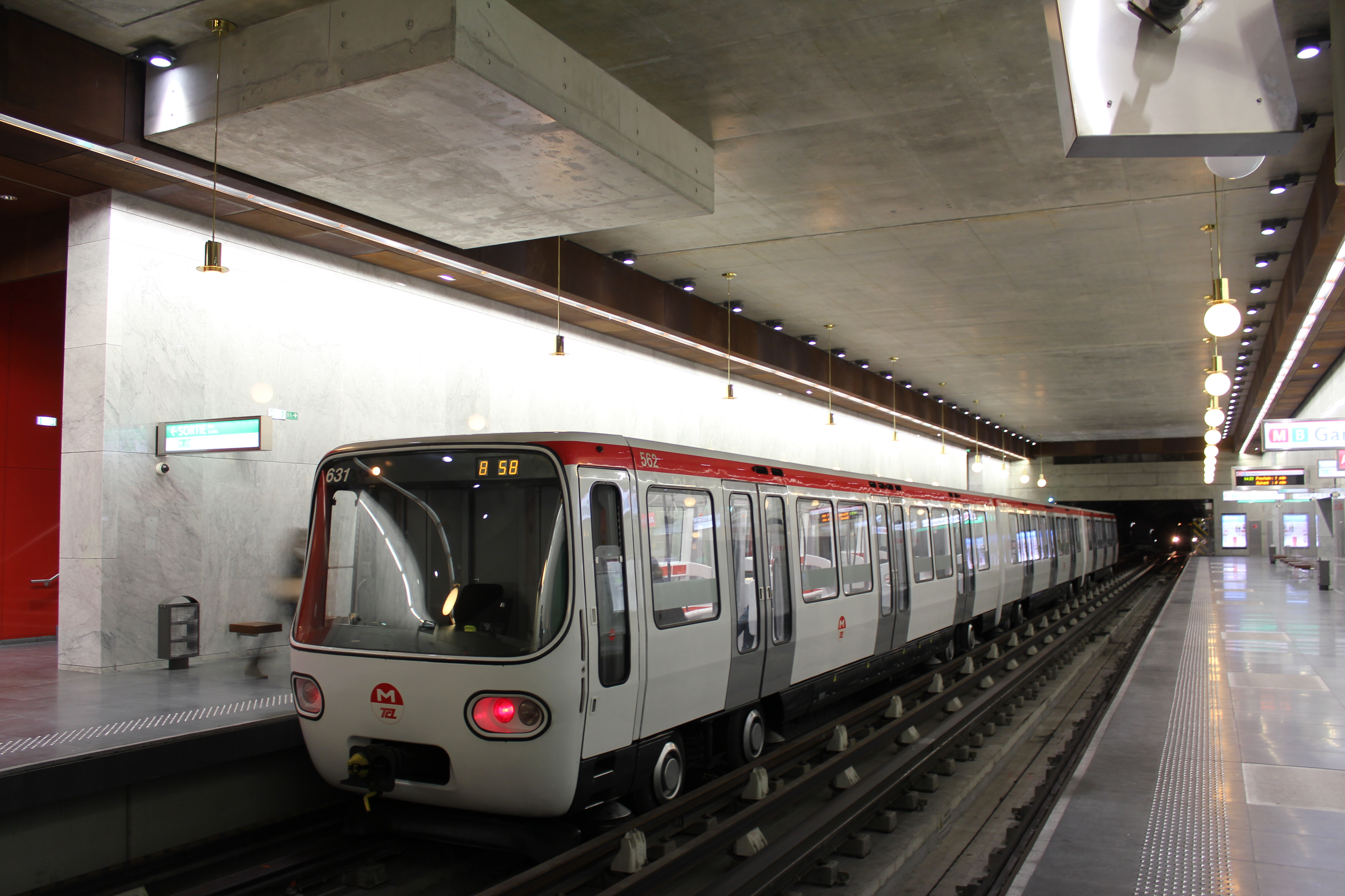 La rame 631 du réseau TCL est vue sur la Ligne B, au nouveau terminus : Gare d'Oullins.